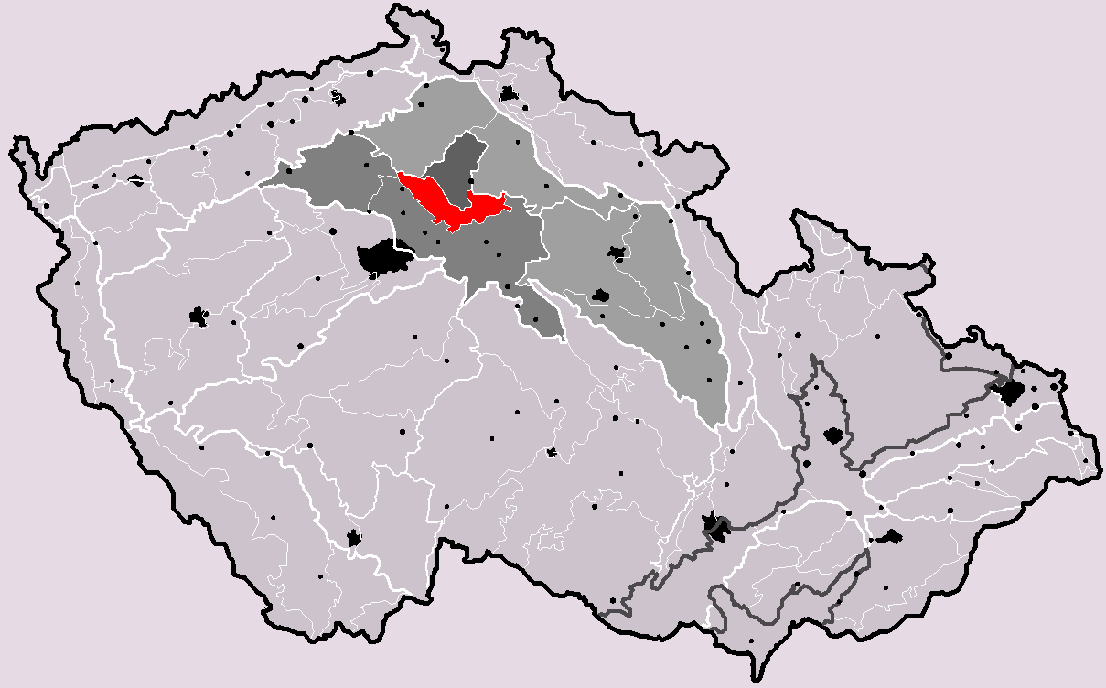 Česky: Poloha geomorfologického podcelku Bělohradská pahorkatina v rámci České republiky. Hercynský systém Hercynská pohoří I Česká vysočina I6 (VI) Česká tabule I6B (VIB) Středočeská tabule I6B-2 (VIB-2) Jizerská tabule (VIB-2B) Dolnojizerská tabule